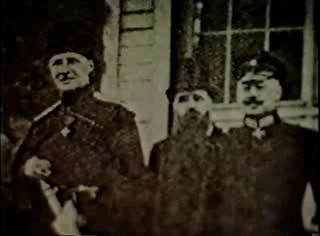 Гетман Павел Скоропадский (слева), в фуражке крайний справа А.А. Палтов.